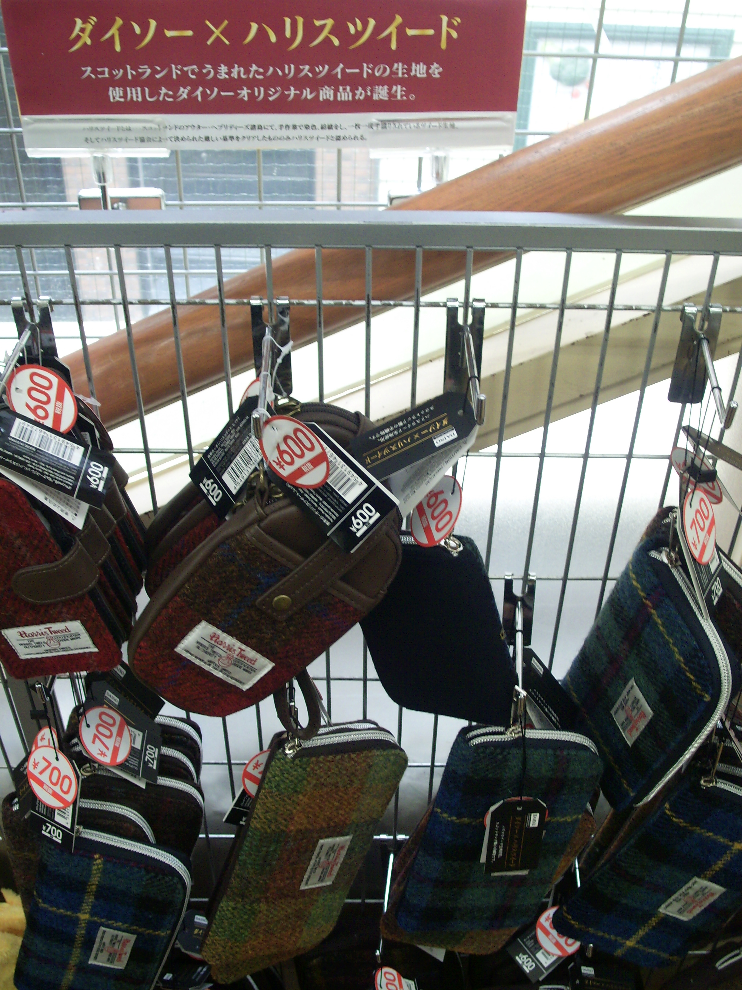 百均のダイソーがタイアップした英国王室御用達ブランドのハリスツイードの商品（但し100円ではない）